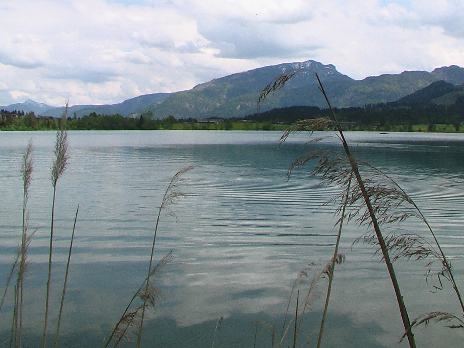 Blick über den Walchsee (Tirol) - Aufnahme vom Hotel Bellevue aus